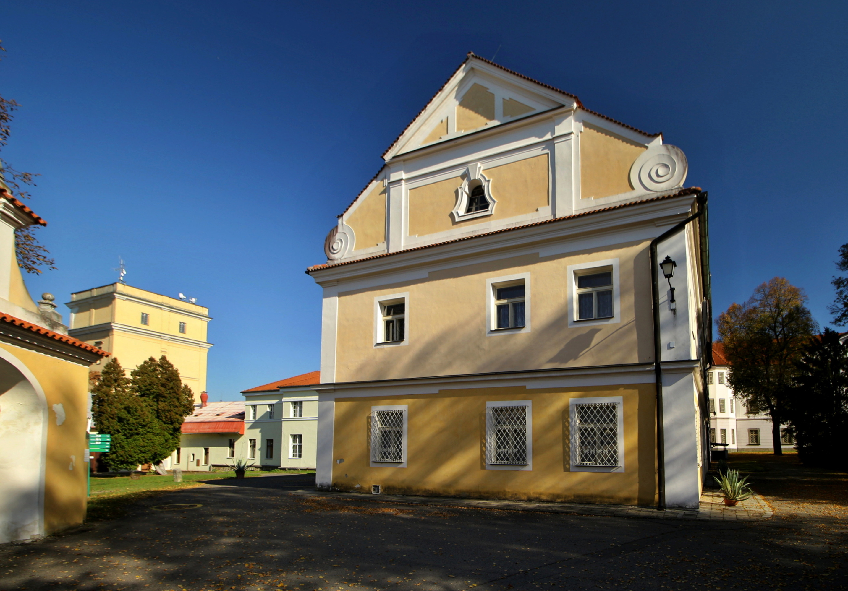 Opařany, okres Tábor